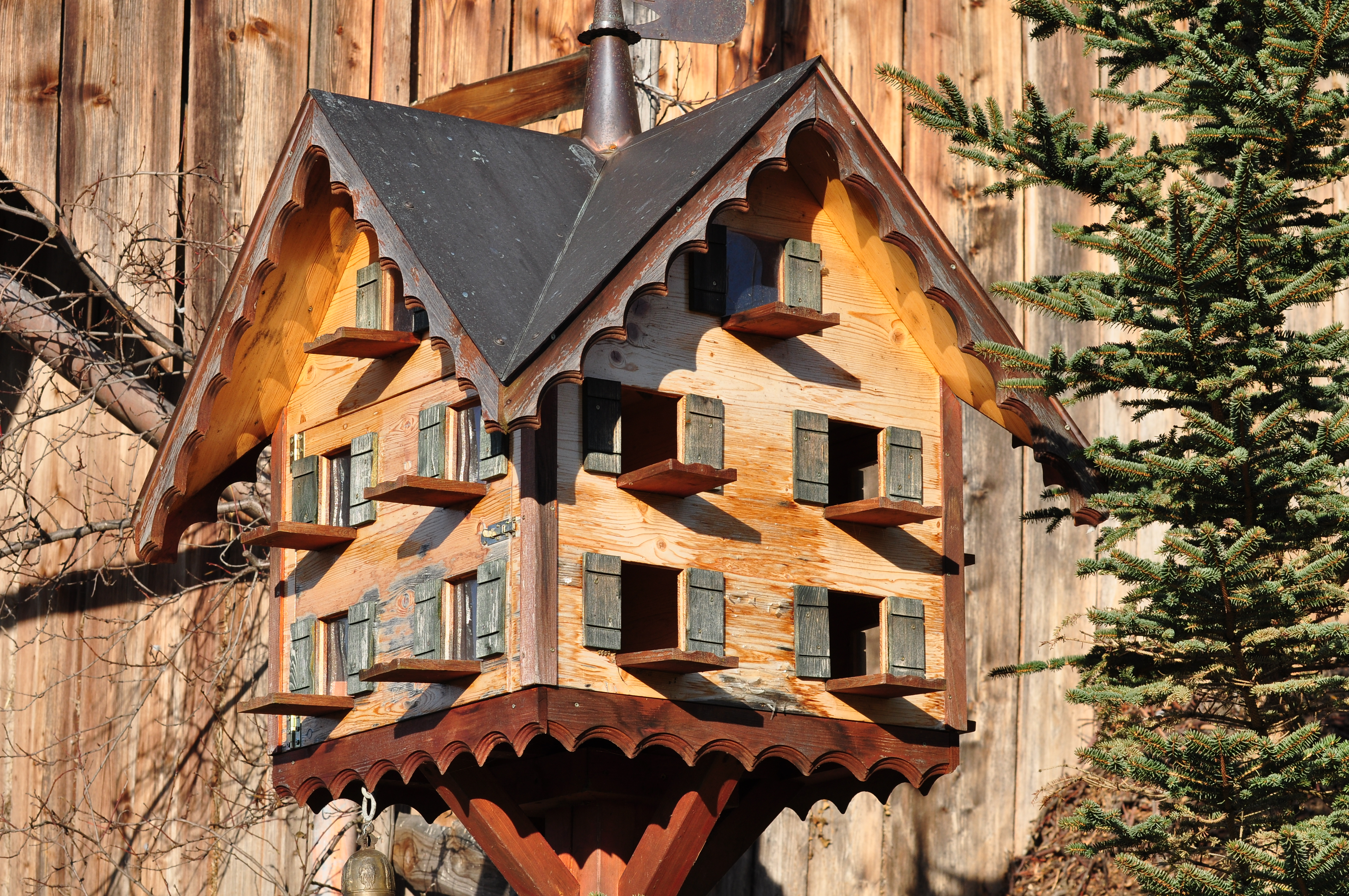 Barenberg in Bubikon (Switzerland)